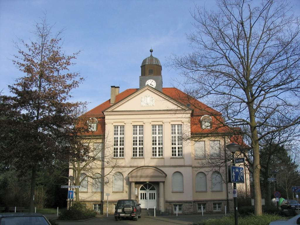 Rathaus Essen-Heisingen vom 05.02.2005